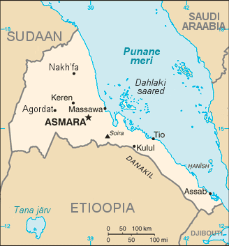 Eritrea kaart